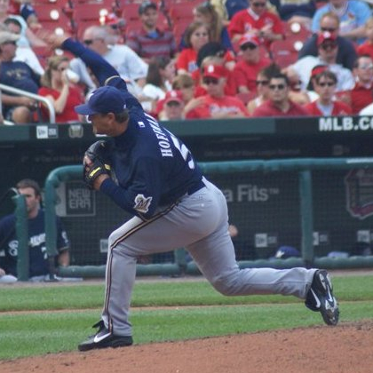 Trevor Hoffman